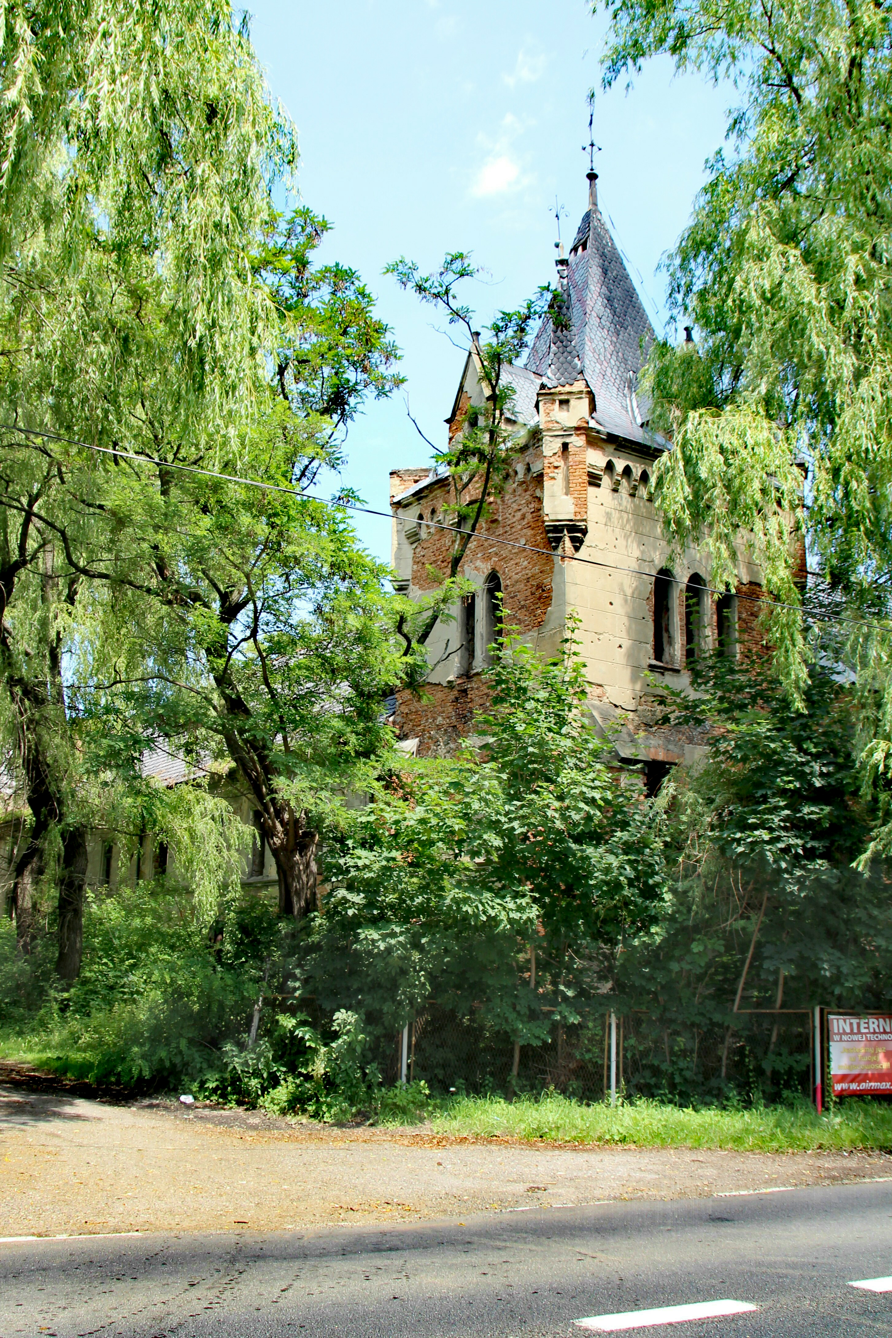 Łąka Prudnicka -wieś w Polsce w województwie opolskim, w powiecie prudnickim w gminie Prudnik.